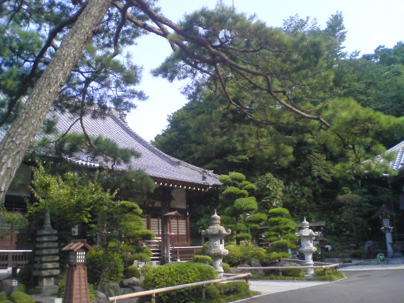 安立寺の本堂を斜めから写したもの。2008年8月12日に撮影。撮影者はNorinoyama本人。